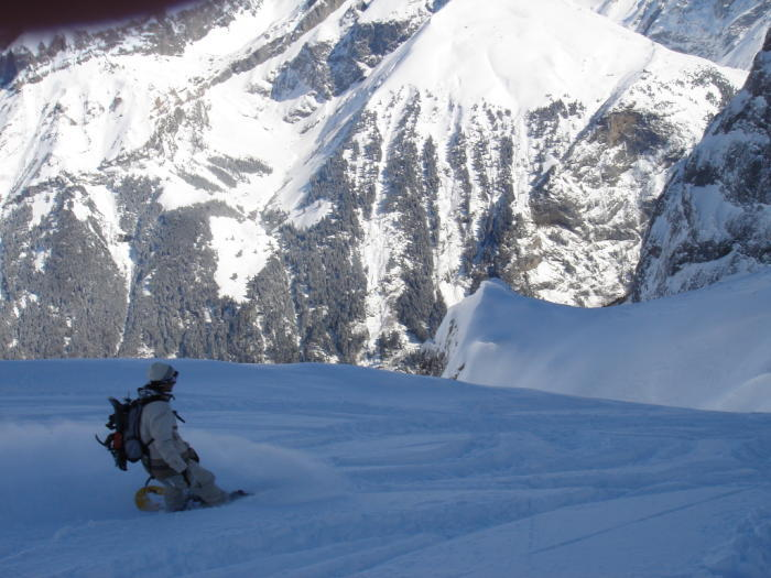 Sole freerider in Switzerland